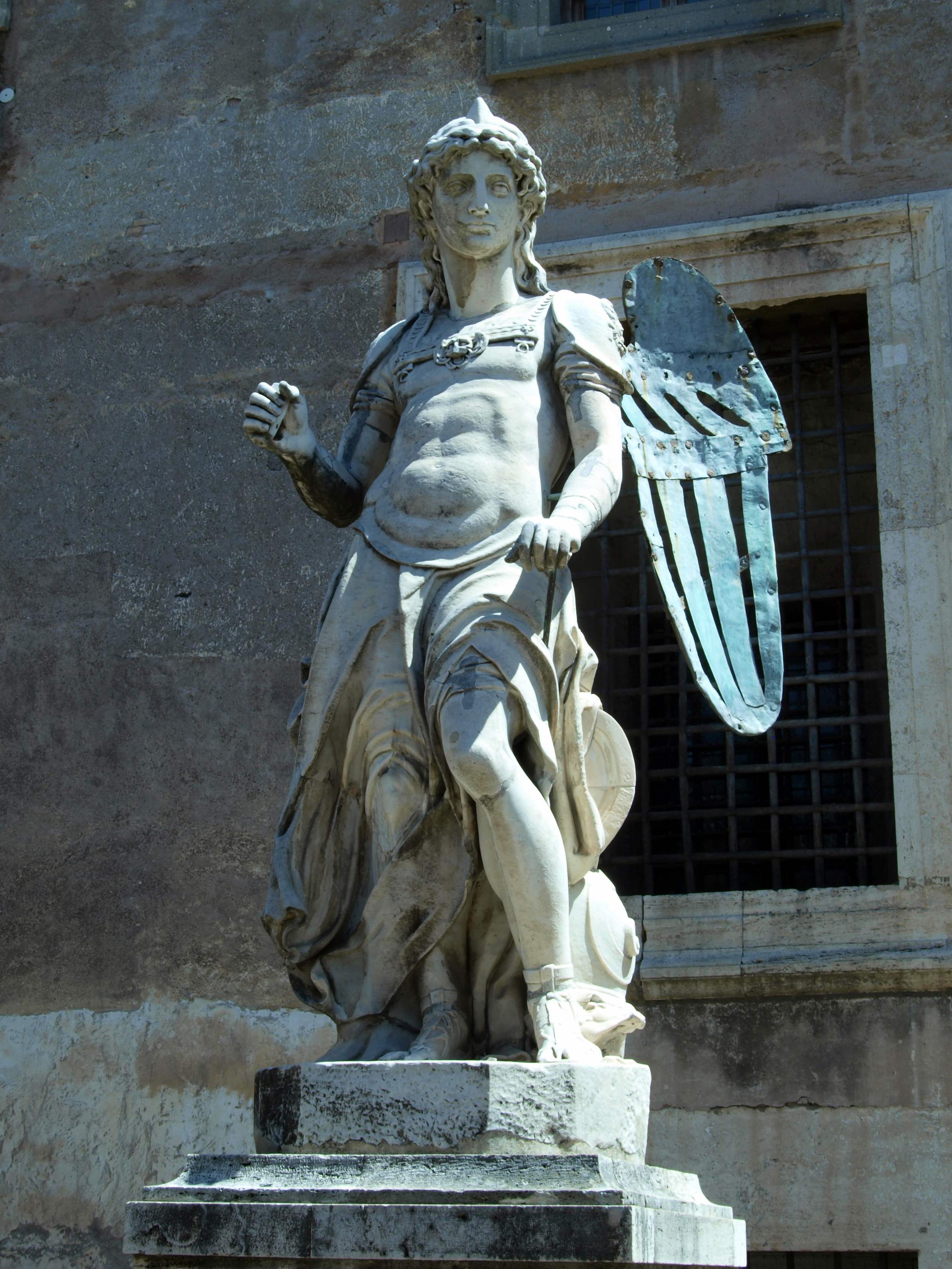 Castel Sant'Angelo (Rome) - Angel by Raffaello da Montelupo